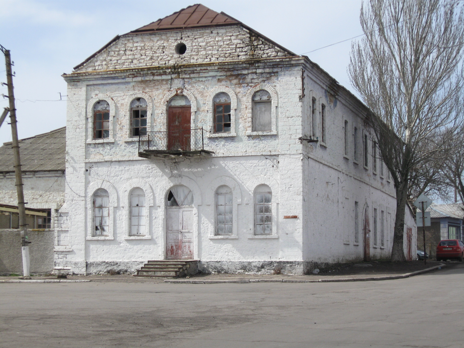 Паровий млин, Снігурівський район, Місто Снігурівка, вул. Чайковського. 69